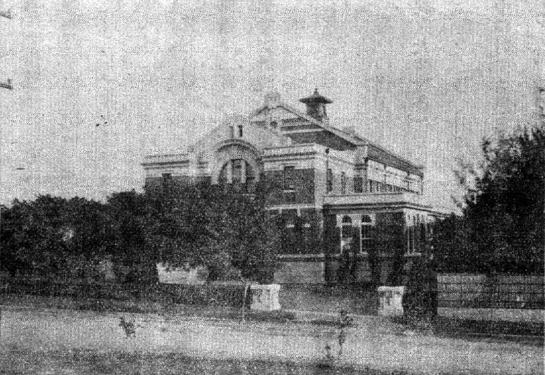 臺中公會堂於1932年完工，現已拆除改作自由路立體停車場